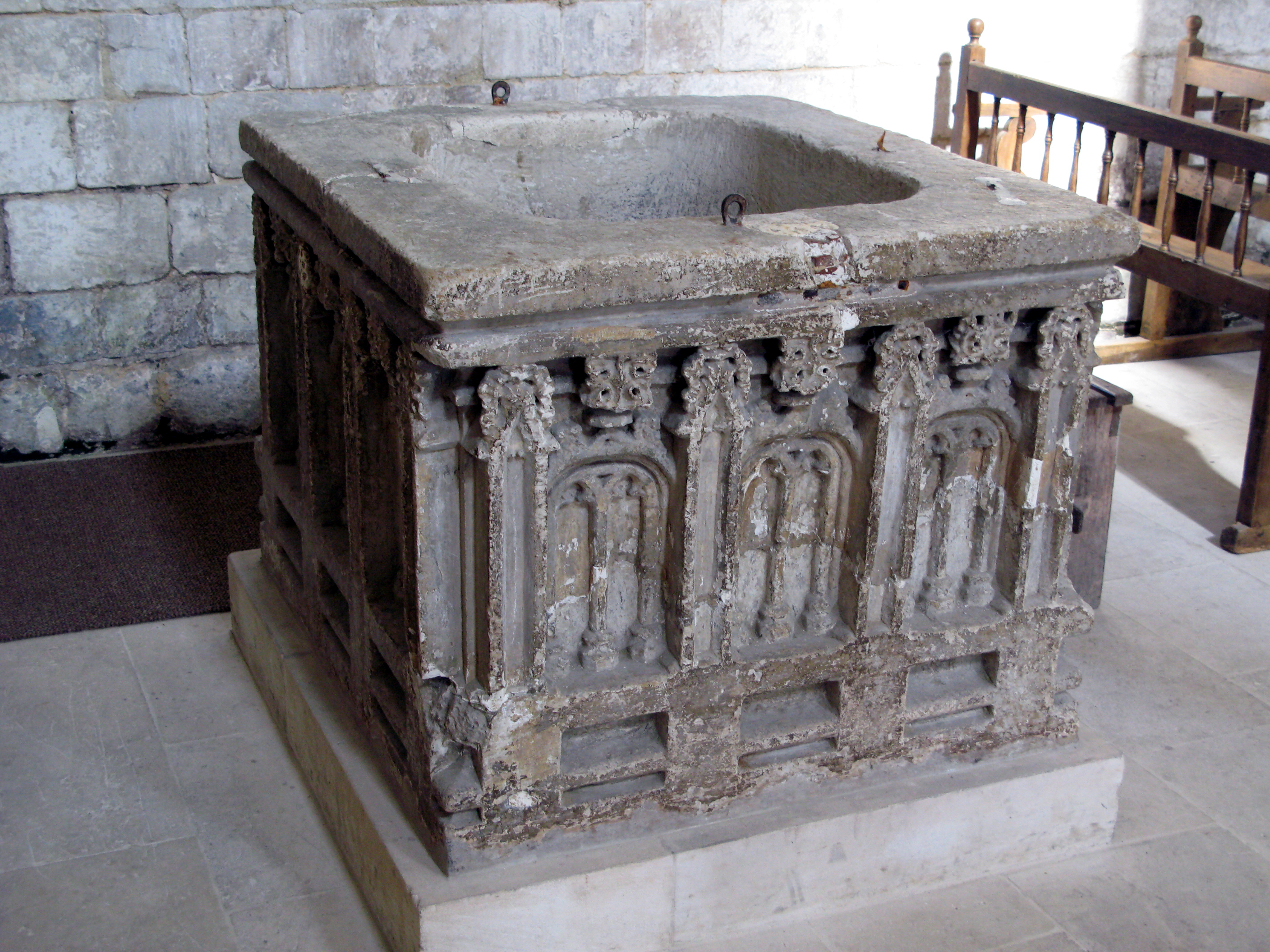 Picquigny (Somme, France) - Les fonts baptismaux de l'église sont installés dans l'angle Nord-Ouest (près de l'entrée du souterrain).